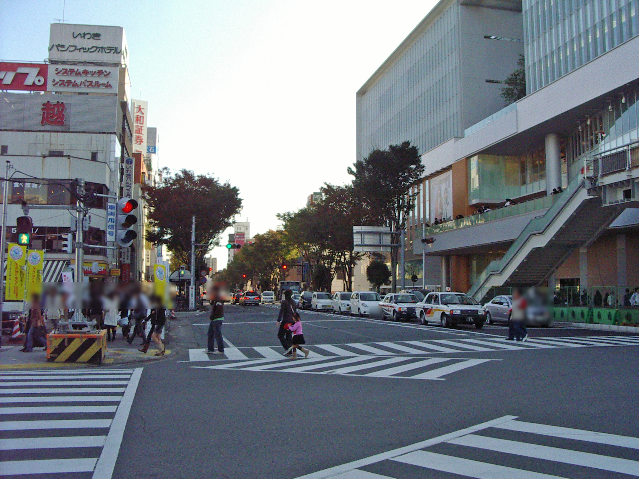 JR常磐線、磐越東線いわき駅